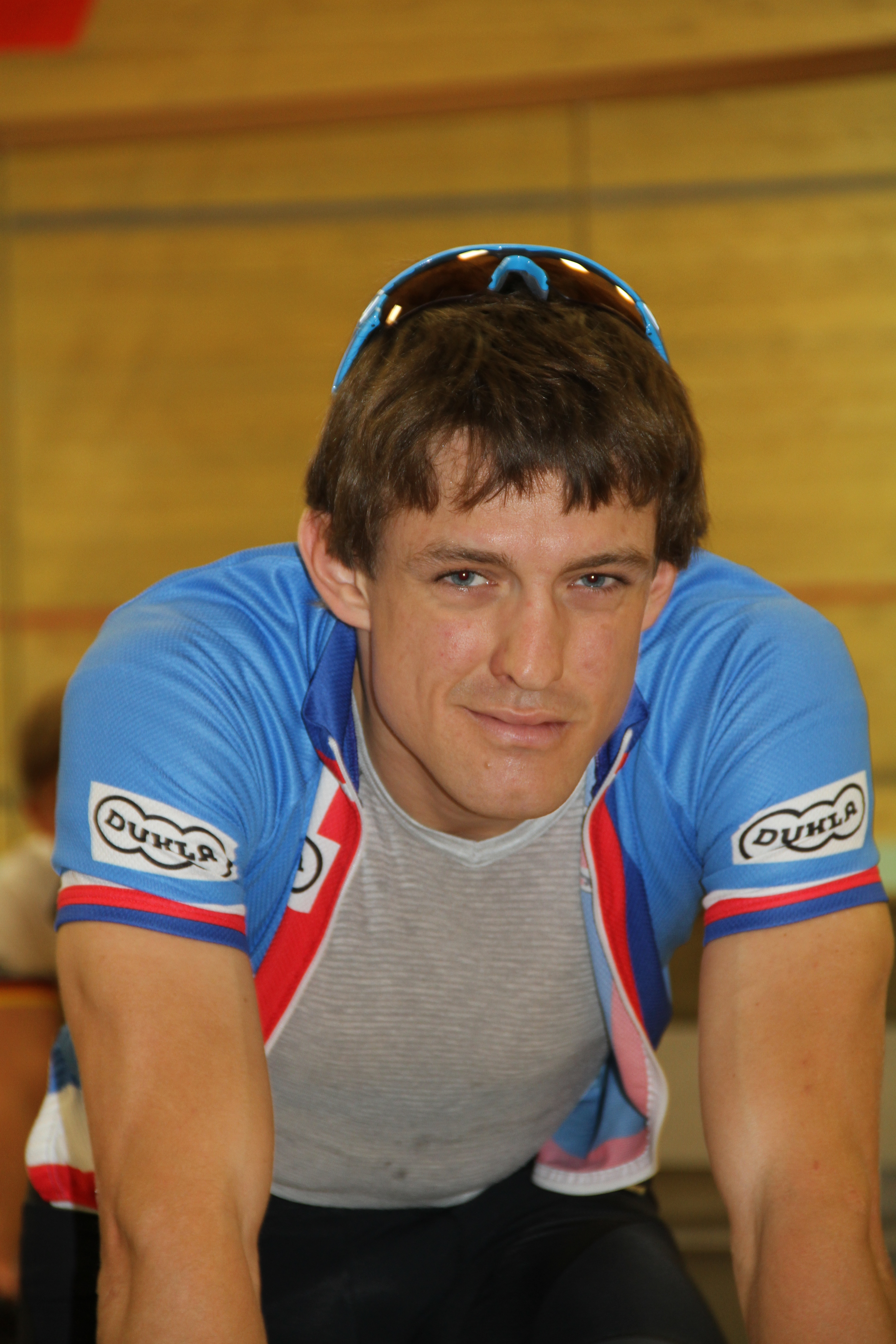 Vojtěch Hačecký, tschechischer Radsportler The making of this document was supported by the Community-Budget of Wikimedia Germany.